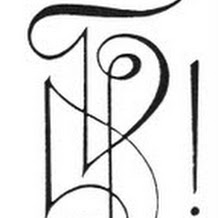 VHS-Graz